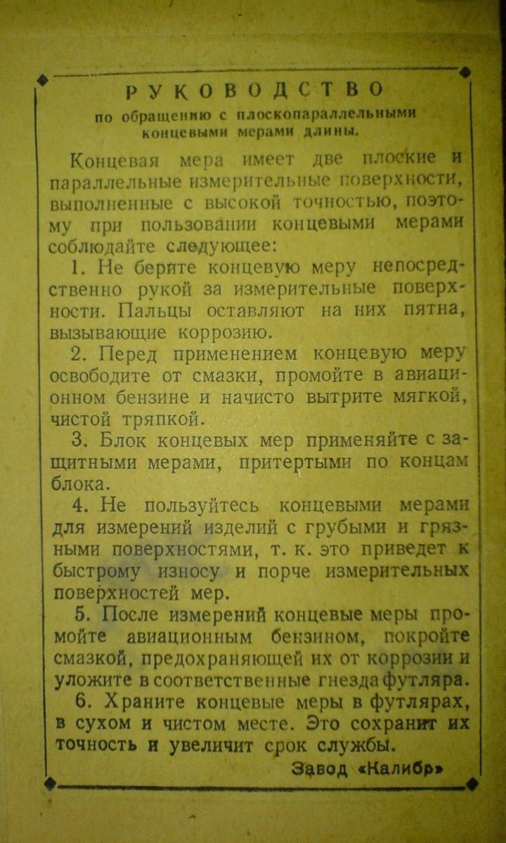 Правила и рекомендации